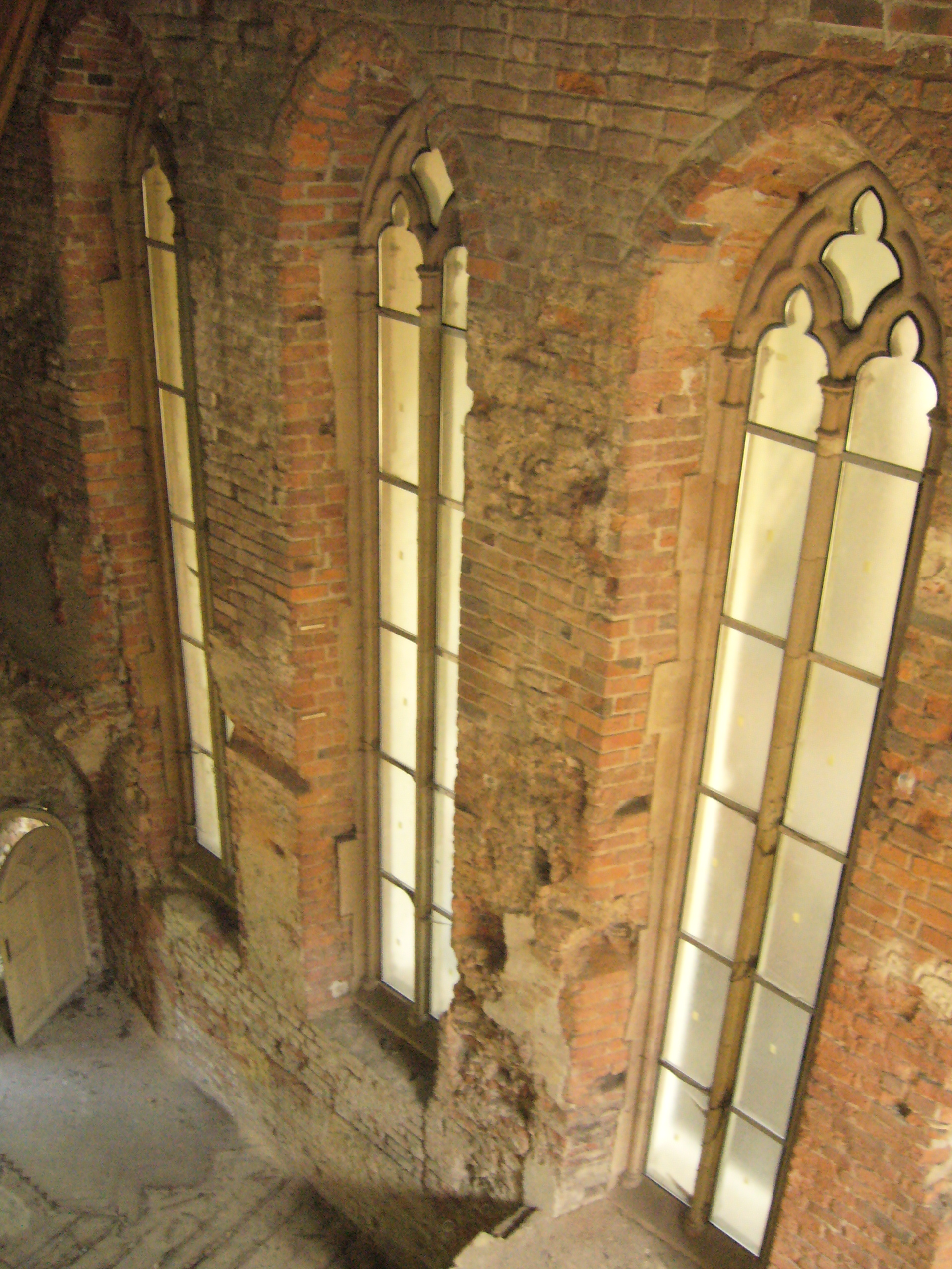 Kaplica zamkowa w Raciborzu. Okna w ścianie północnej kaplicy sąsiadującej z pomieszczeniami zamkowymi, widok ze schodów na poddasze